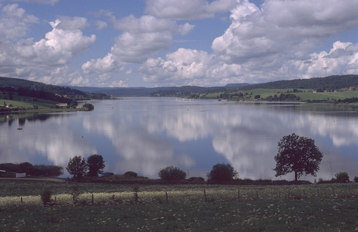 Franz. Jura, See bei Pontarlier, Lac de Saint Point